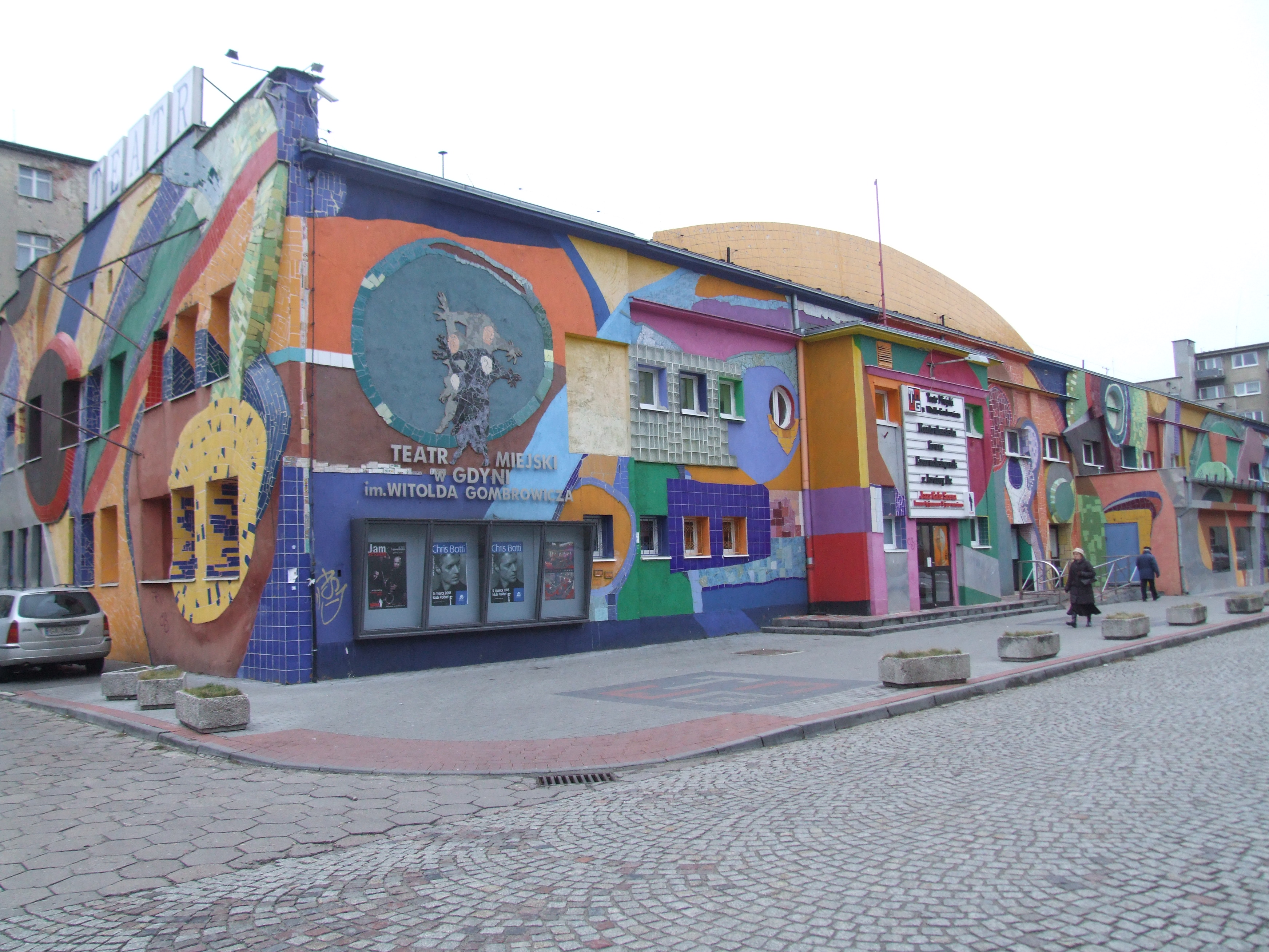 Teatr Miejski im. Witolda Gombrowicza w Gdyni